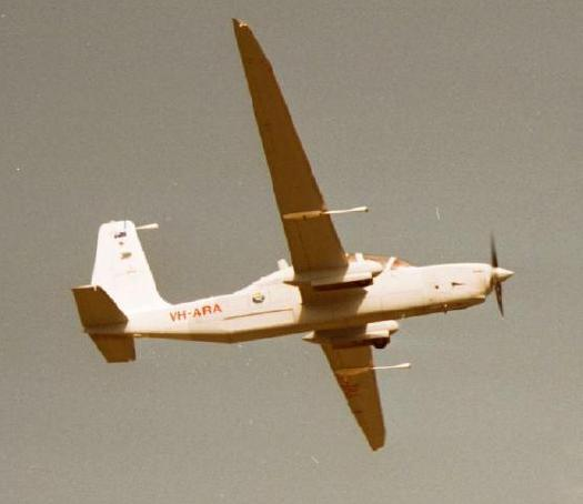 Grob/E-Systems/AlliedSignal D-520T Egrett II